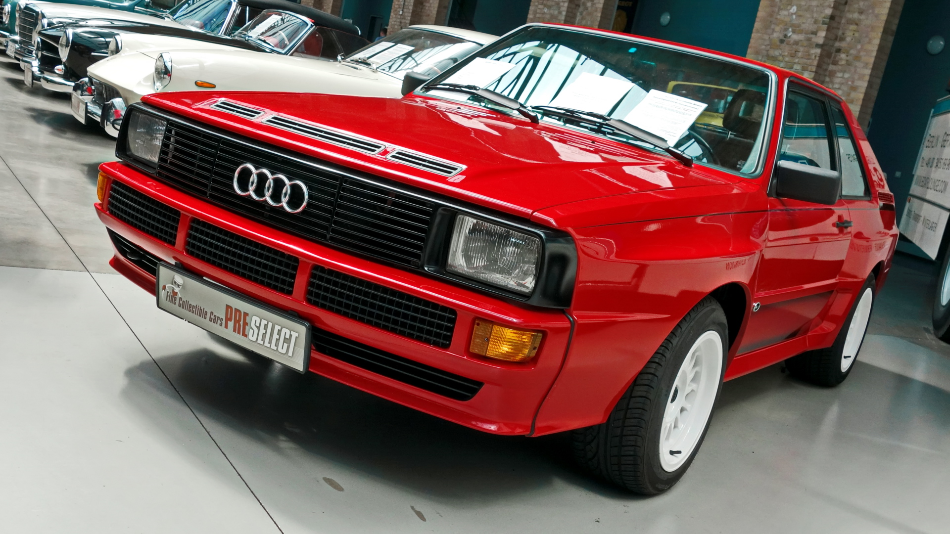 Audi Sport quattro